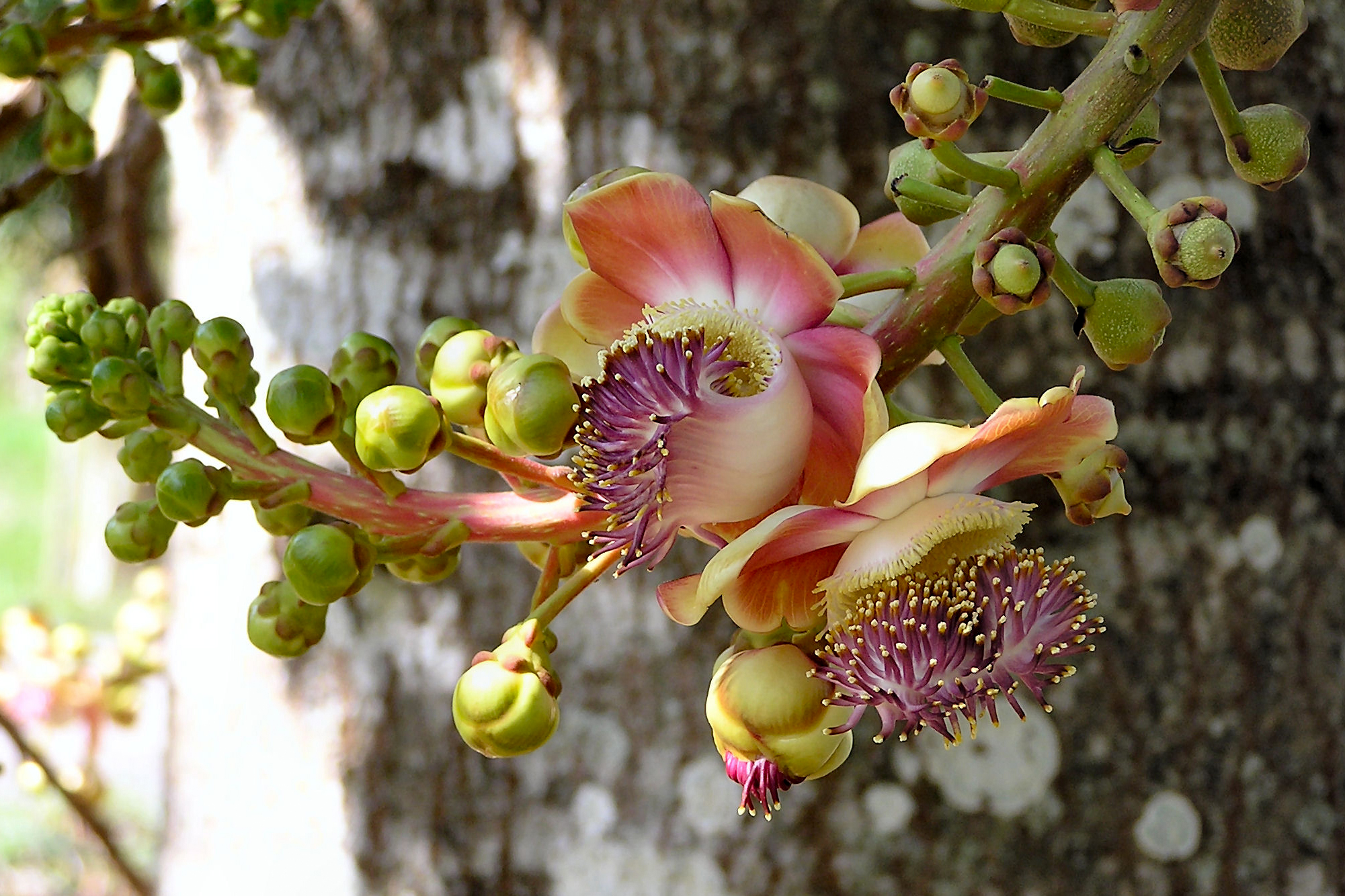 Fleurs de Couroupita guianensis (ou Boulet de canon) au jardin botanique de Cienfuegos - Cuba